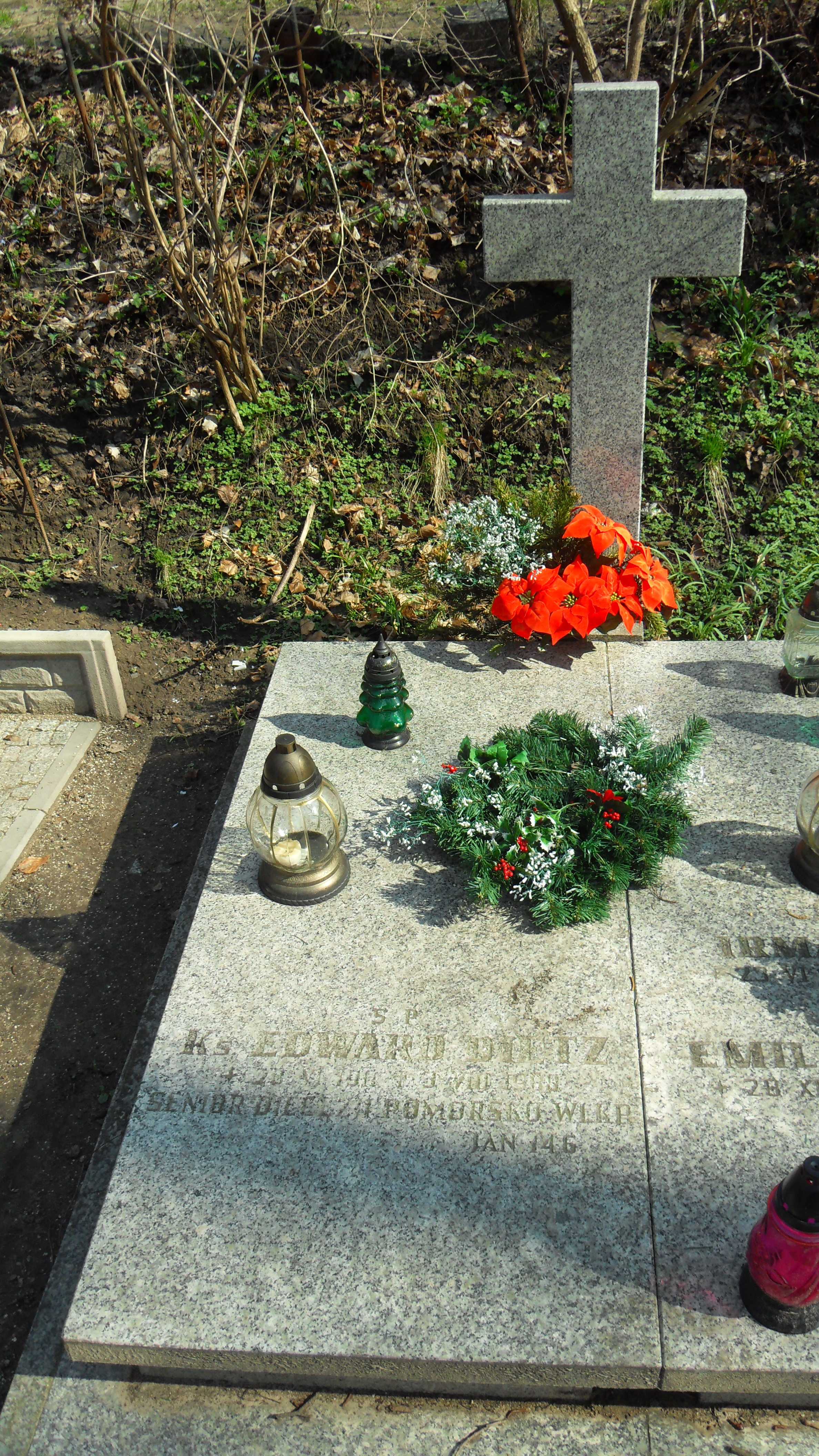 Gdańsk Wrzeszcz. Cmentarz Srebrzysko, grób ks. Edwarda Dietza.